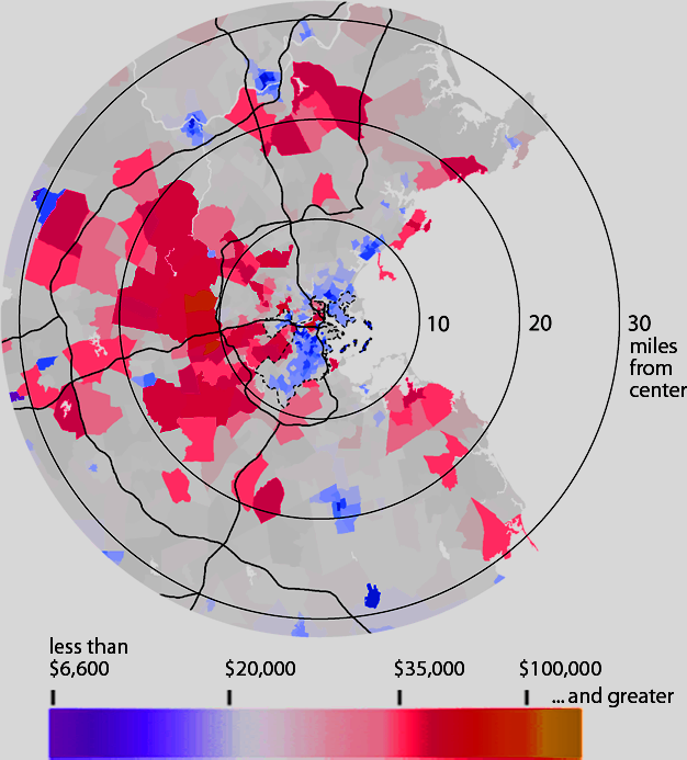 Income divisions in Boston